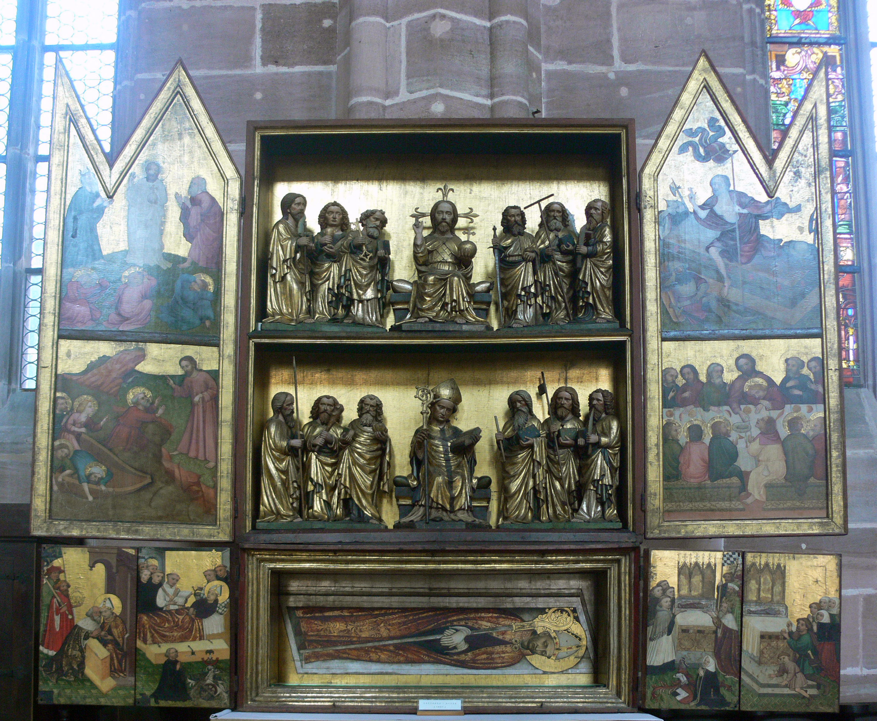 Nuremberg - St. Lorenz